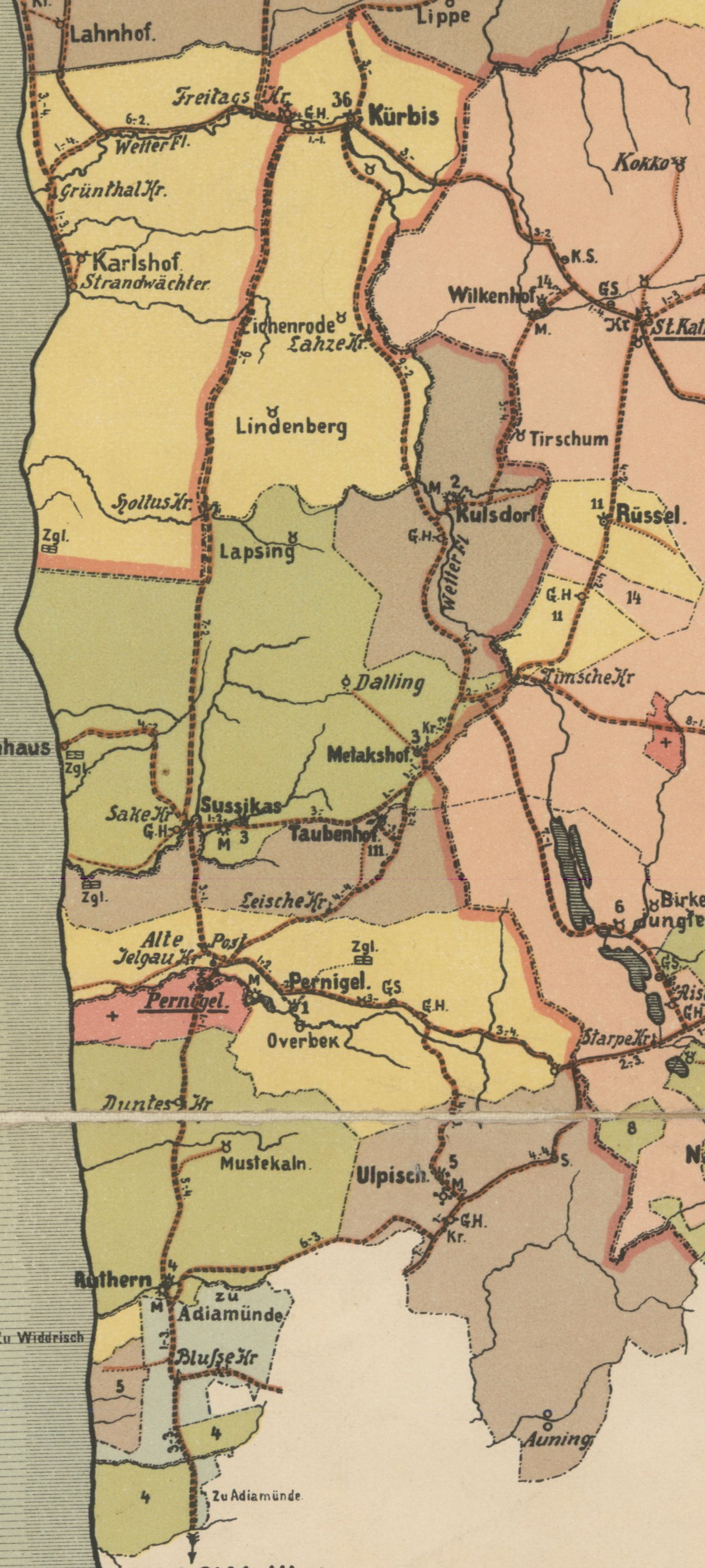 Liepupe kihelkonna mõisad 1903. aasta kaardil.